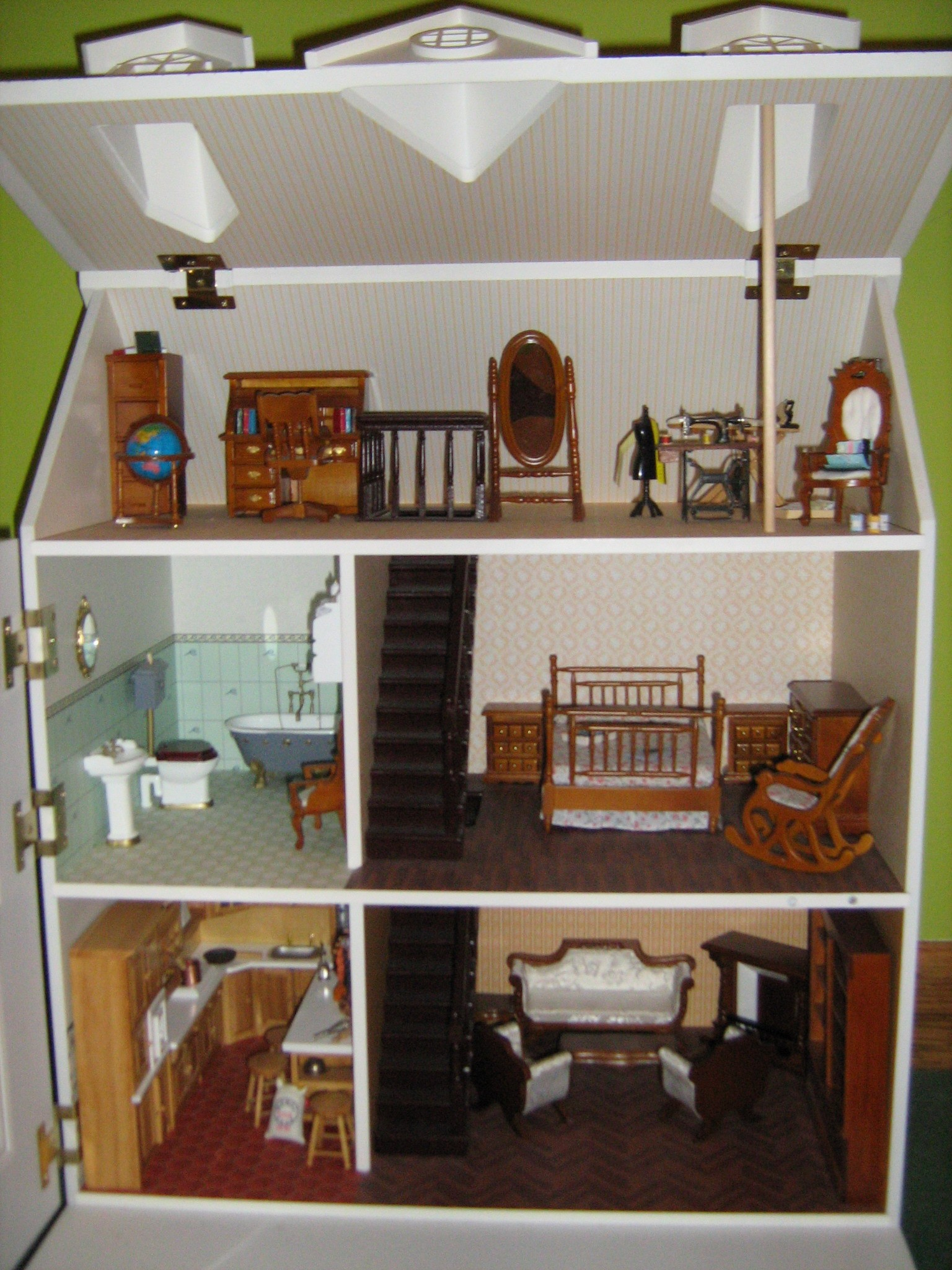 Maketa etxetxoa.